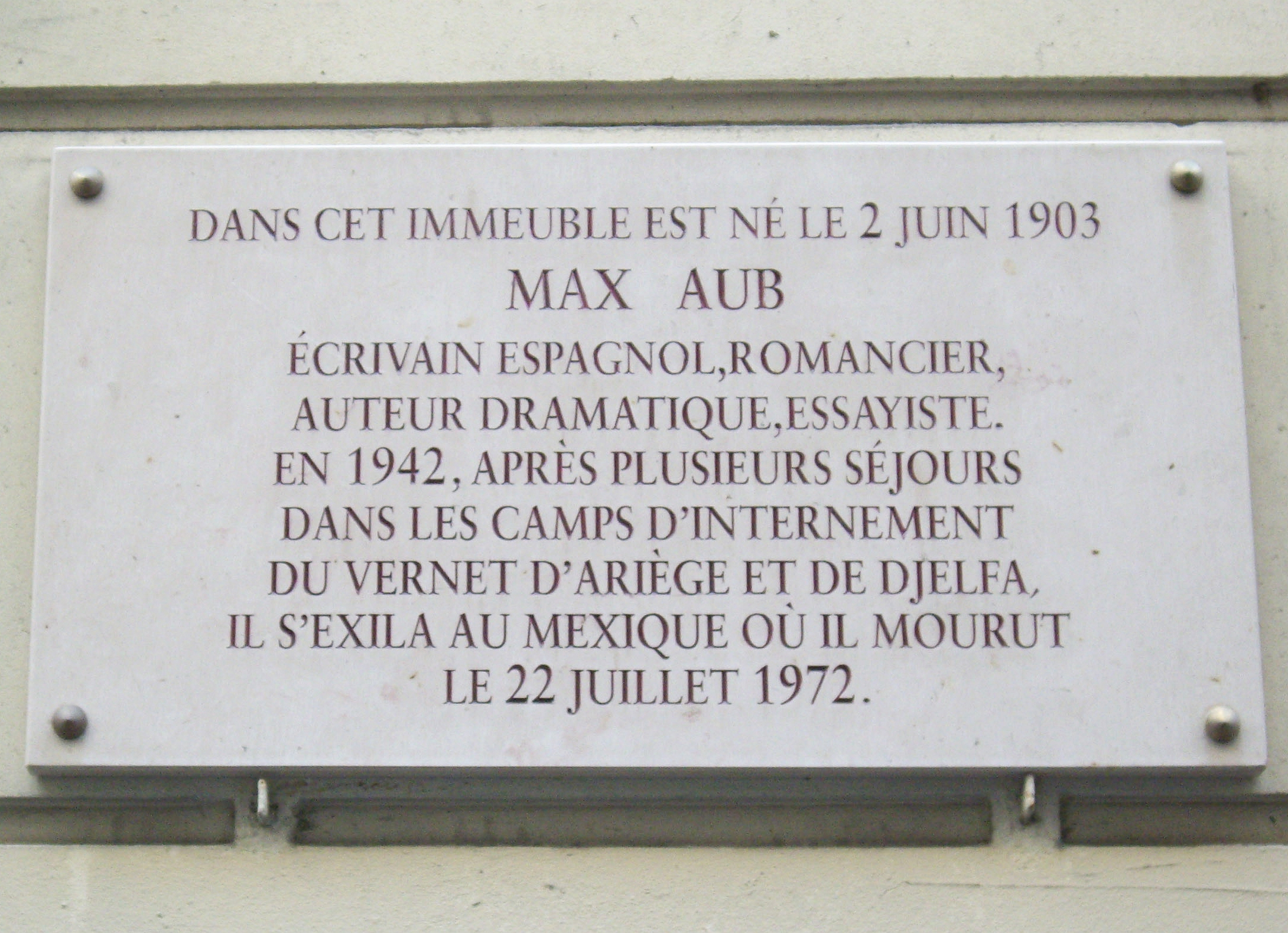 Plaque commémorative, 3 cité de Trévise, Paris 9e.« Dans cet immeuble est né le 2 juin 1903 Max Aub, écrivain espagnol, romancier, auteur dramatique, essayiste. En 1942, après plusieurs séjours dans les camps d'internement du Vernet, d'Ariège et de Djelfa, il s'exila au Mexique où il mourut le 22 juillet 1972. »